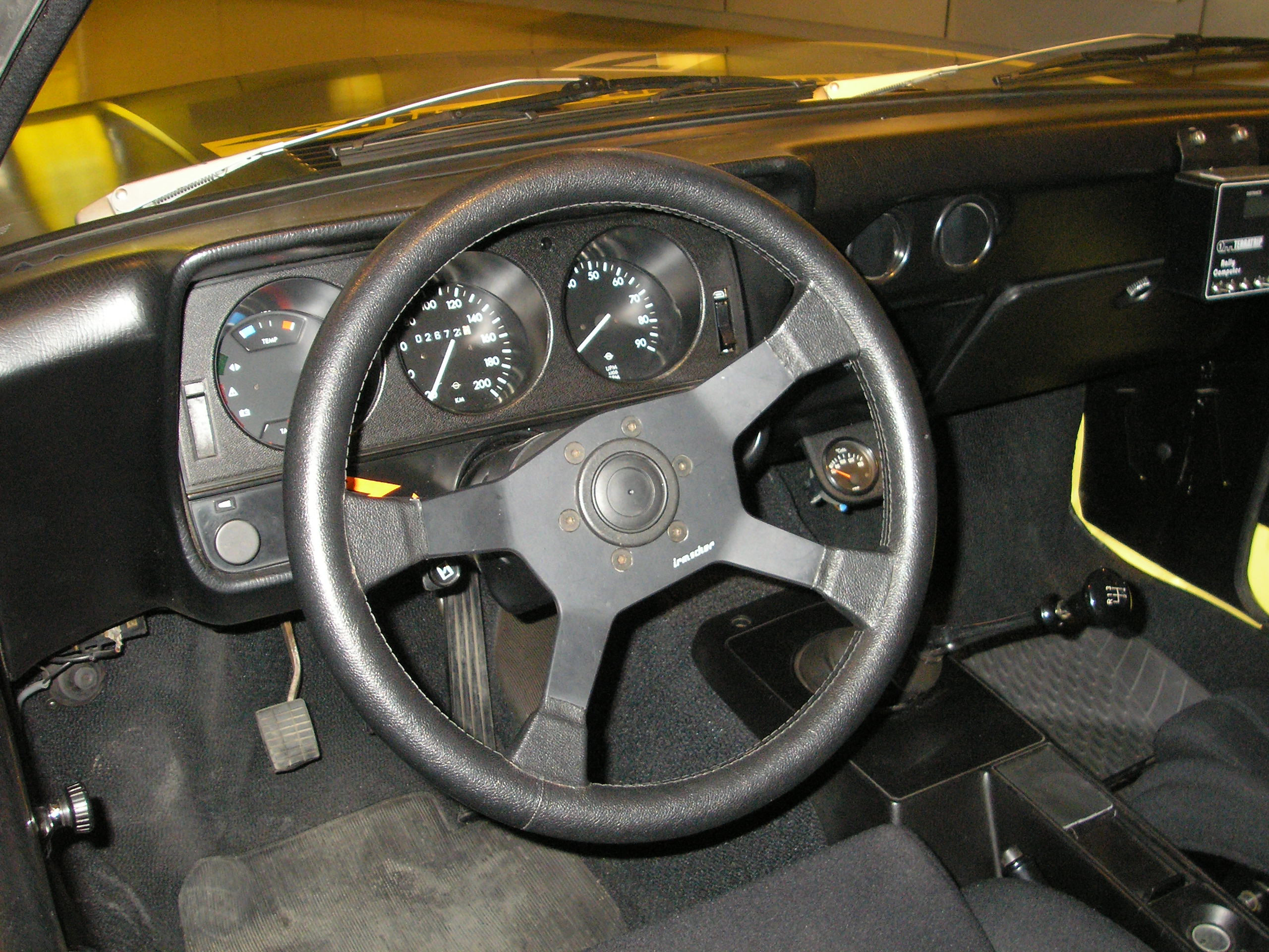 Description: Innenansicht vom Opel Manta A "Spa Francorchamps", im Opel Zentrum in Berlin an der Friedrichstraße. Baujahr 1974, 4 Zylinder, ca. 200 PS, bis zu 200 km/h je nach Übersetzung. Nahm am 26. und 27. Juli 1975 am "Spa Francorchamps" Rennen teil, gefahren von Walter Röhrl und Rauno Altonen. Interior of the Opel Manta A "Spa Francorchamps", in the Opel Zentrum in Berlin at Friedrichstraße. Model from 1974, used in the race in July 1975 by Walter Röhrl and Rauno Altonen. Source: self-made, I release it into the public domain. Gryffindor 17:27, 9 March 2006 (UTC)